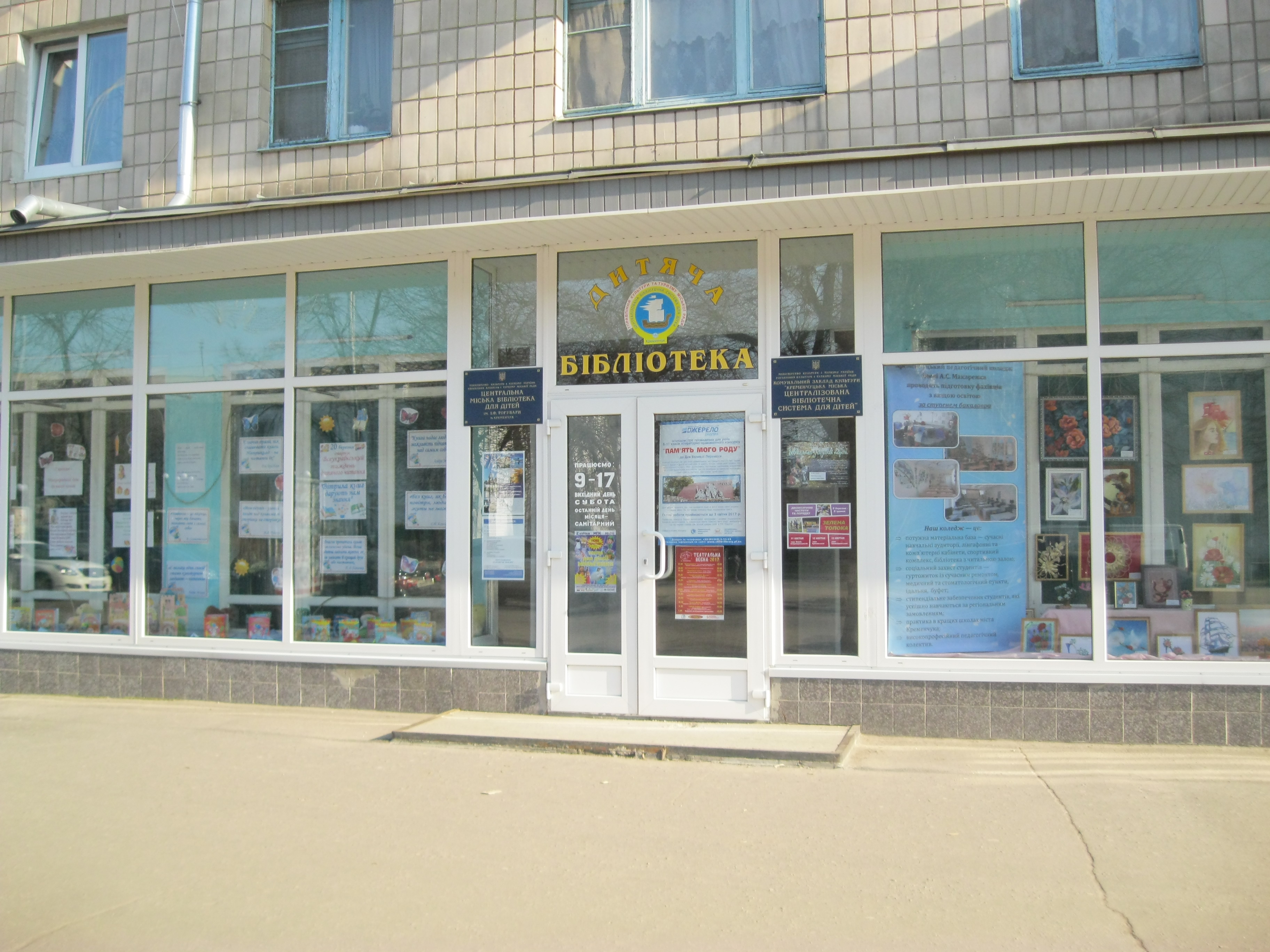 Центральна міська бібліотека для дітей ім. І. Ф. Торубари (Кременчук)